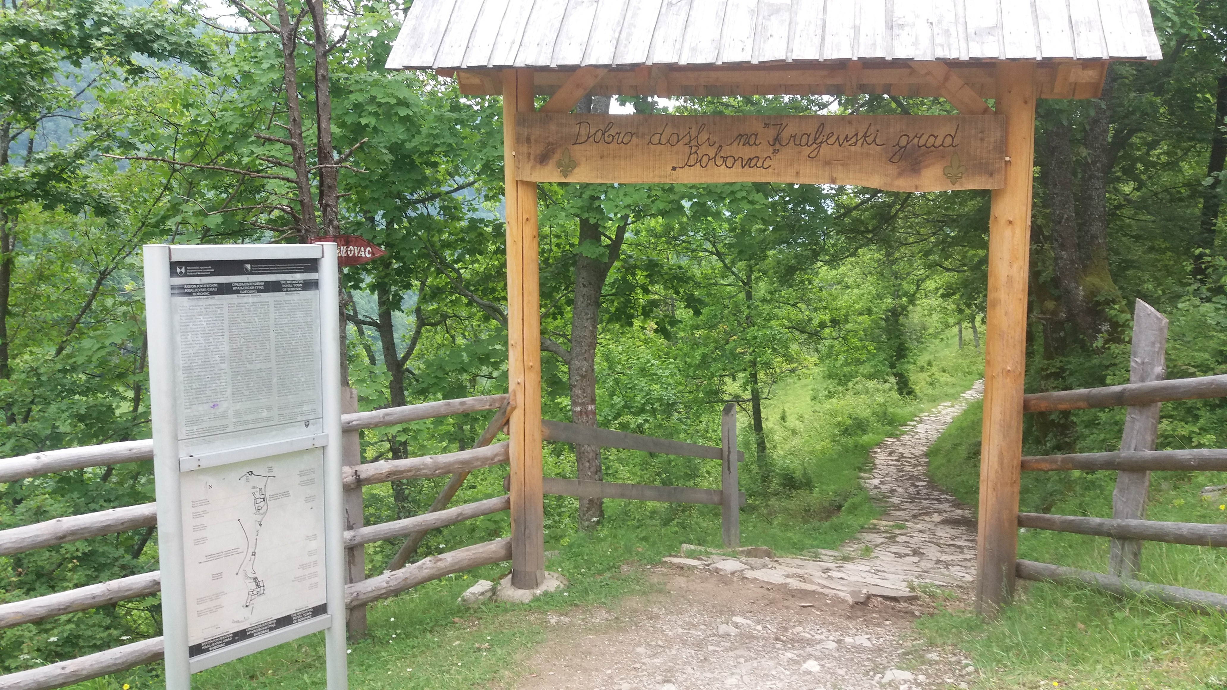 Ulaz u područje Bobovca